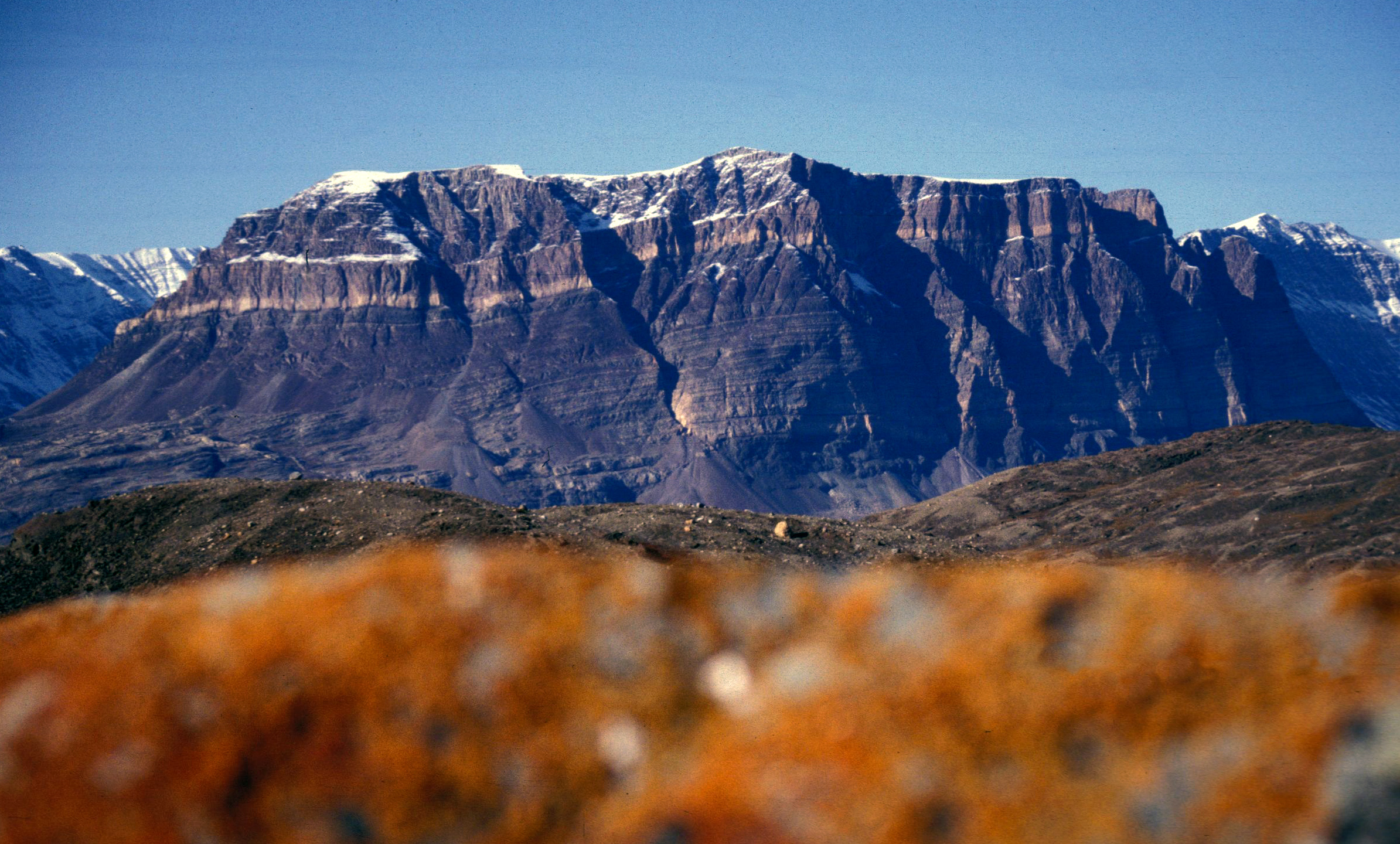 Teufelsschloß, Franz Josef Fjord, East-Greenland